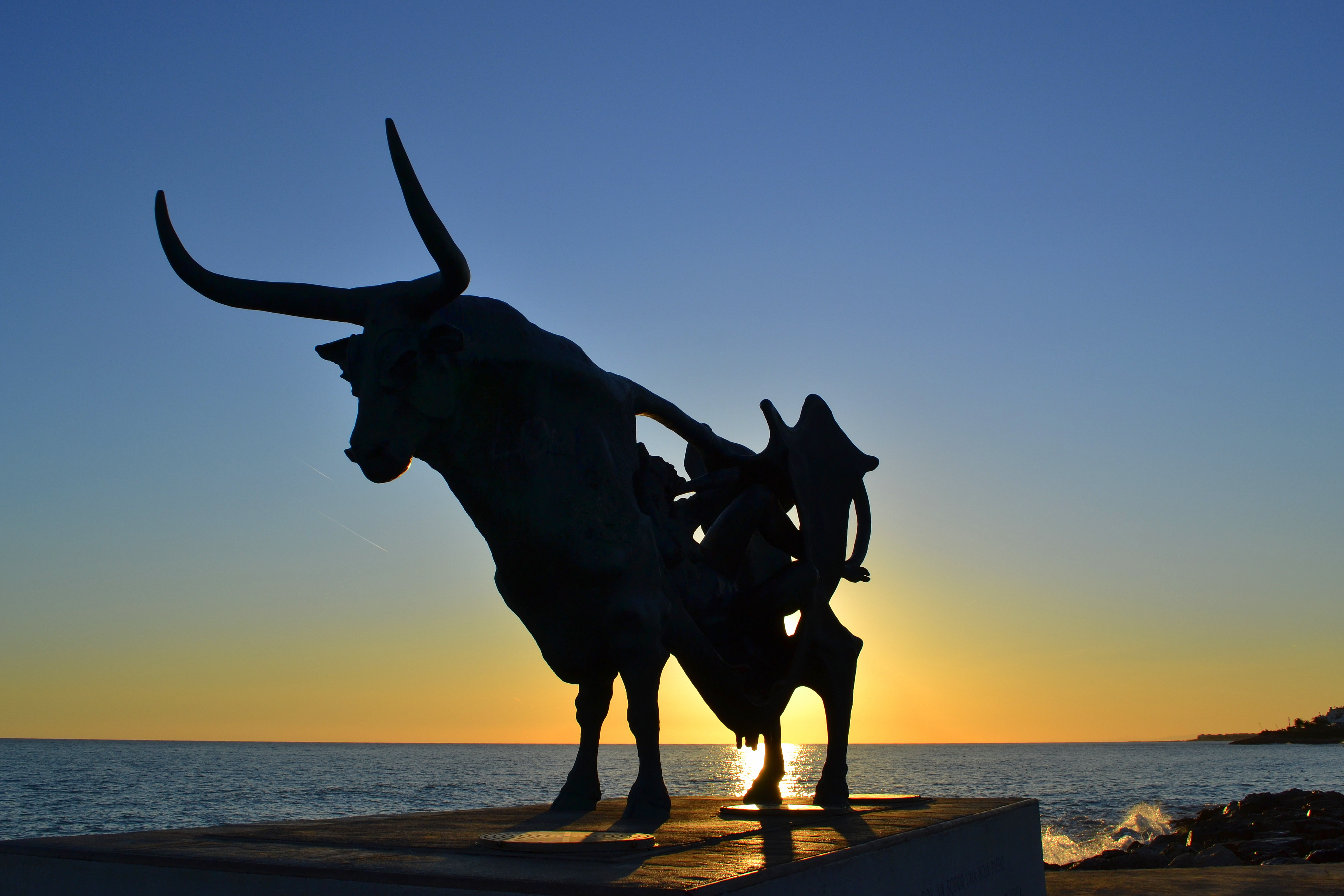 Platja d'AdarrÃ³ (Vilanova i la GeltrÃº) This is a a photo of a beach in Catalonia, Spain, with id: PL-CT-17003-12880